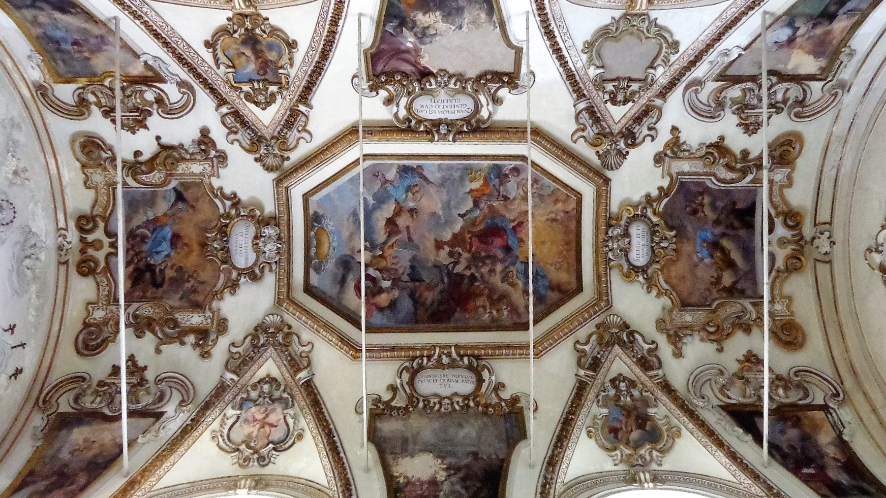 Affreschi volta navata.